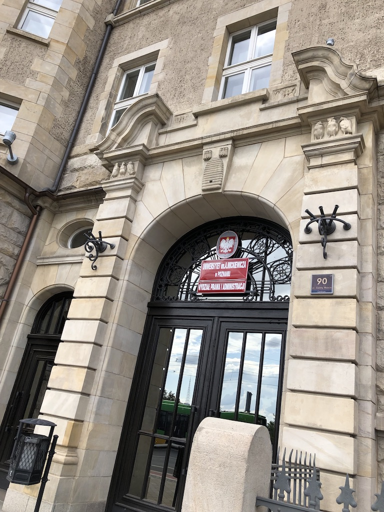 wejście do budynku WPiA UAM